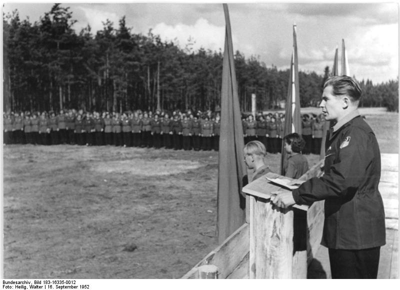 Zentralbild Heilig 16.9.1952 Hei-Zu. Lager des "Dienst für Deutschland" feierlich eröffnet. Am Sonntag, dem 14.9.1952 wurden Lager der Organisation "Dienst für Deutschland" feierlich eröffnet. Unsere Bilder zeigen die Eröffnung eines Lagers im Kreis Pasewalk. UBz: Während der feierlichen Eröffnung. Der Stellvertretende Leiter der Hauptverwaltung, Otto Findeisen, spricht zu den Mitgliedern des Lagers."